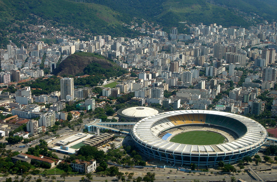 Maracana RJTour Helicoptero 113 Feb 2006